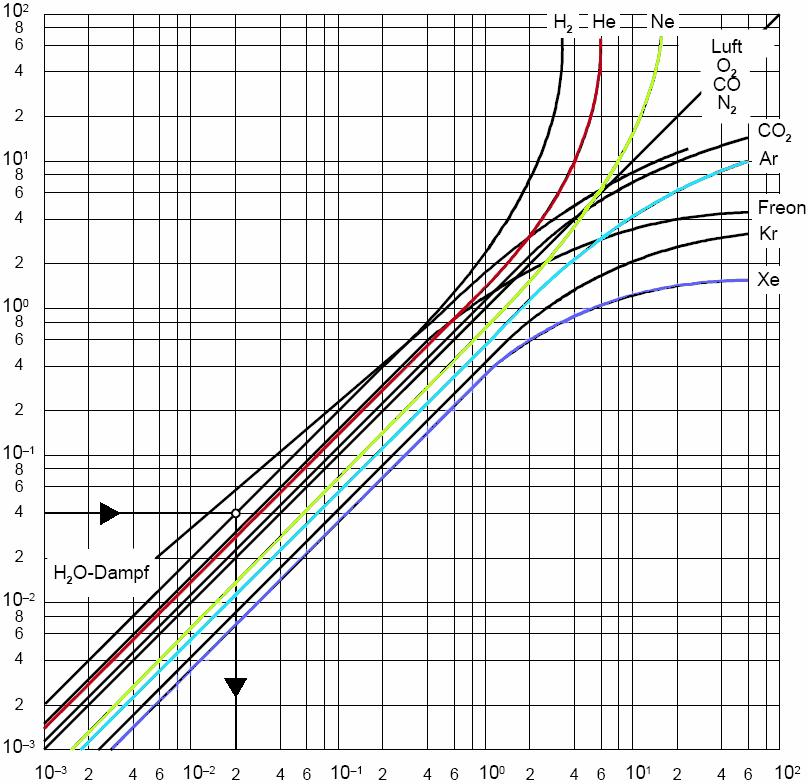 Gasartabhängigkeit des pirani-Vakuummeter